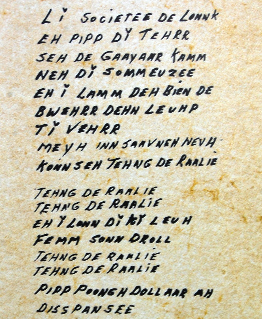 Walon: Tchanson e walon "Tins d' eraler" riscrîte pa Albert Vandertie, on (Walon del Wisconsene)